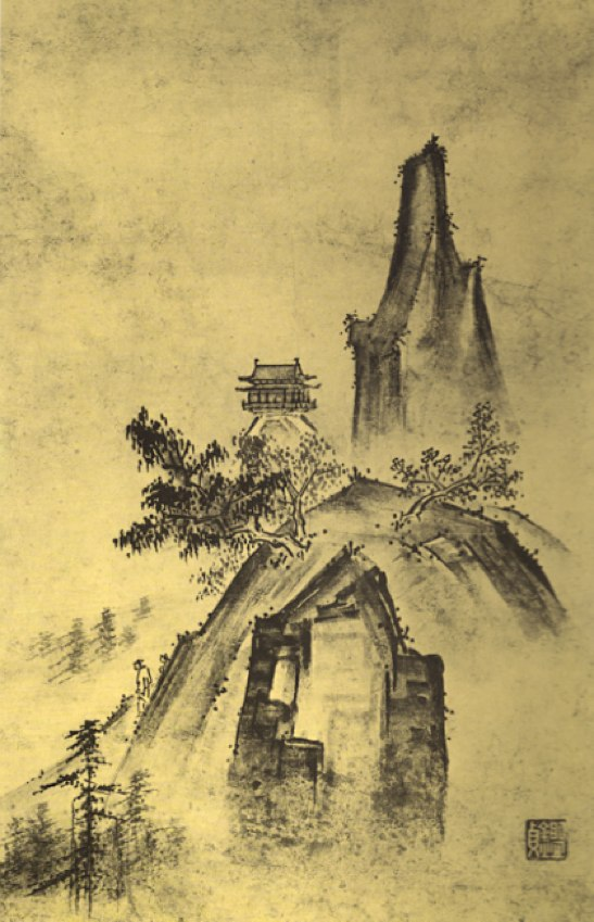 Cloche du soir venant d'un temple lointain, est une œuvre du peintre japonais Kantei du XVe siècle. C'est une encre sur papier de 47,5x31,6 centimètres. Elle est conservée au Musée national de Tokyo.